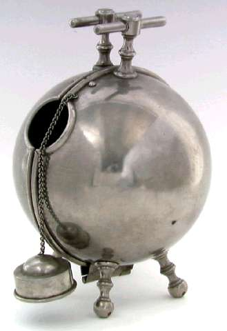 Kaffekulestativ av nikkel brukt i Oslo på første halvdel av 1900-tallet. Foto Norsk Folkemuseum, NF.1956-0974.